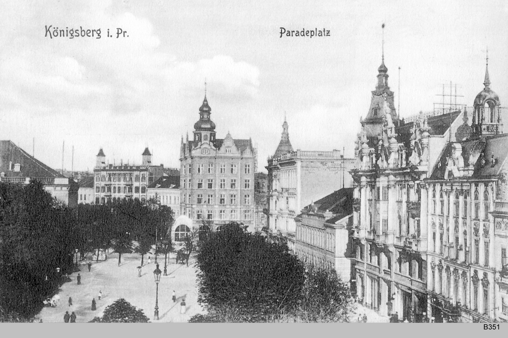 Königsberg